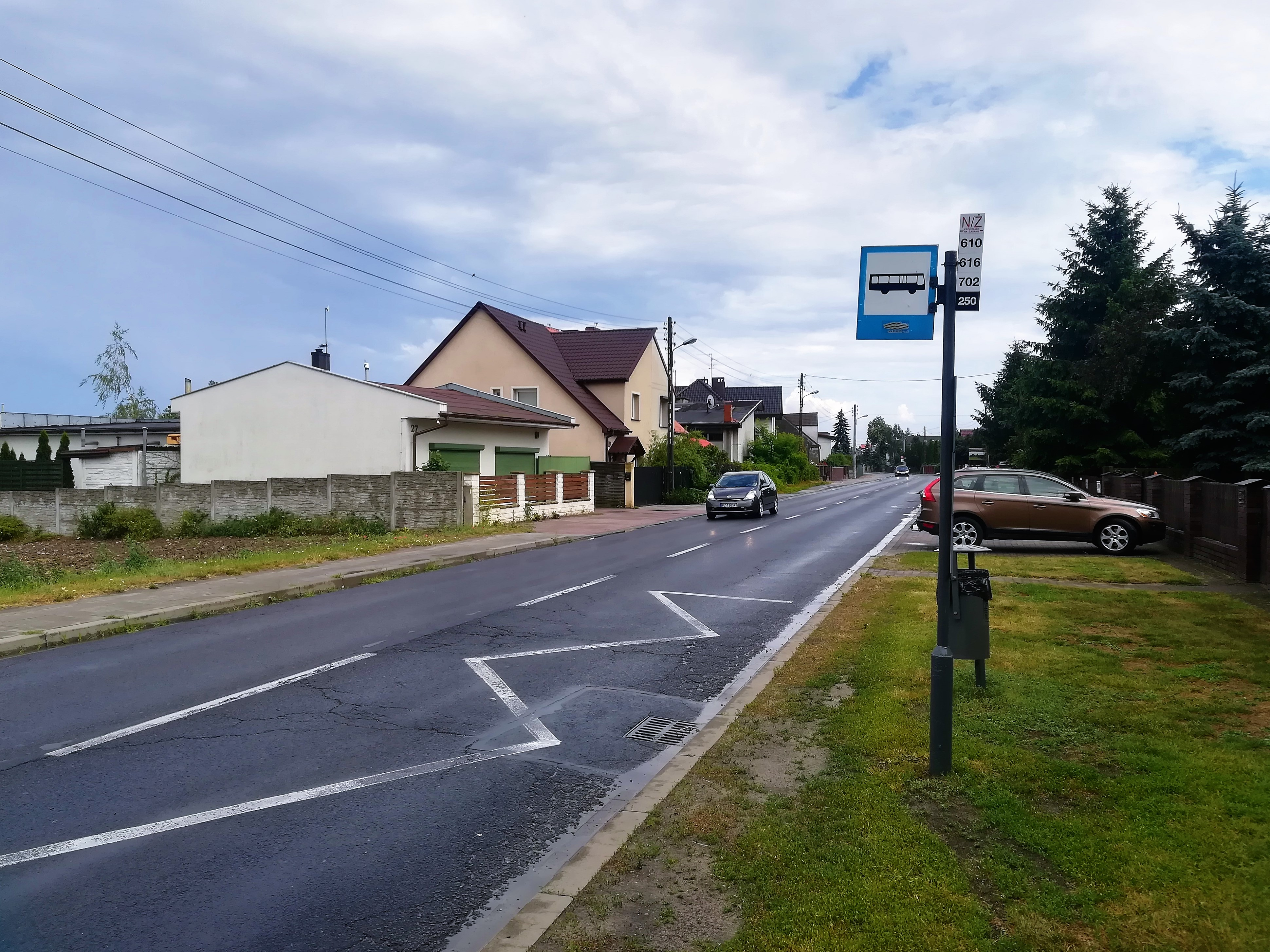 Impresja z poznańskiego Kotowa.